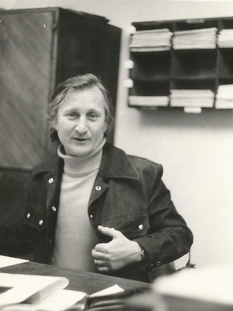 Pintér Tamás író, újságíró az Élet és Irodalom szerkesztőségében, Budapest